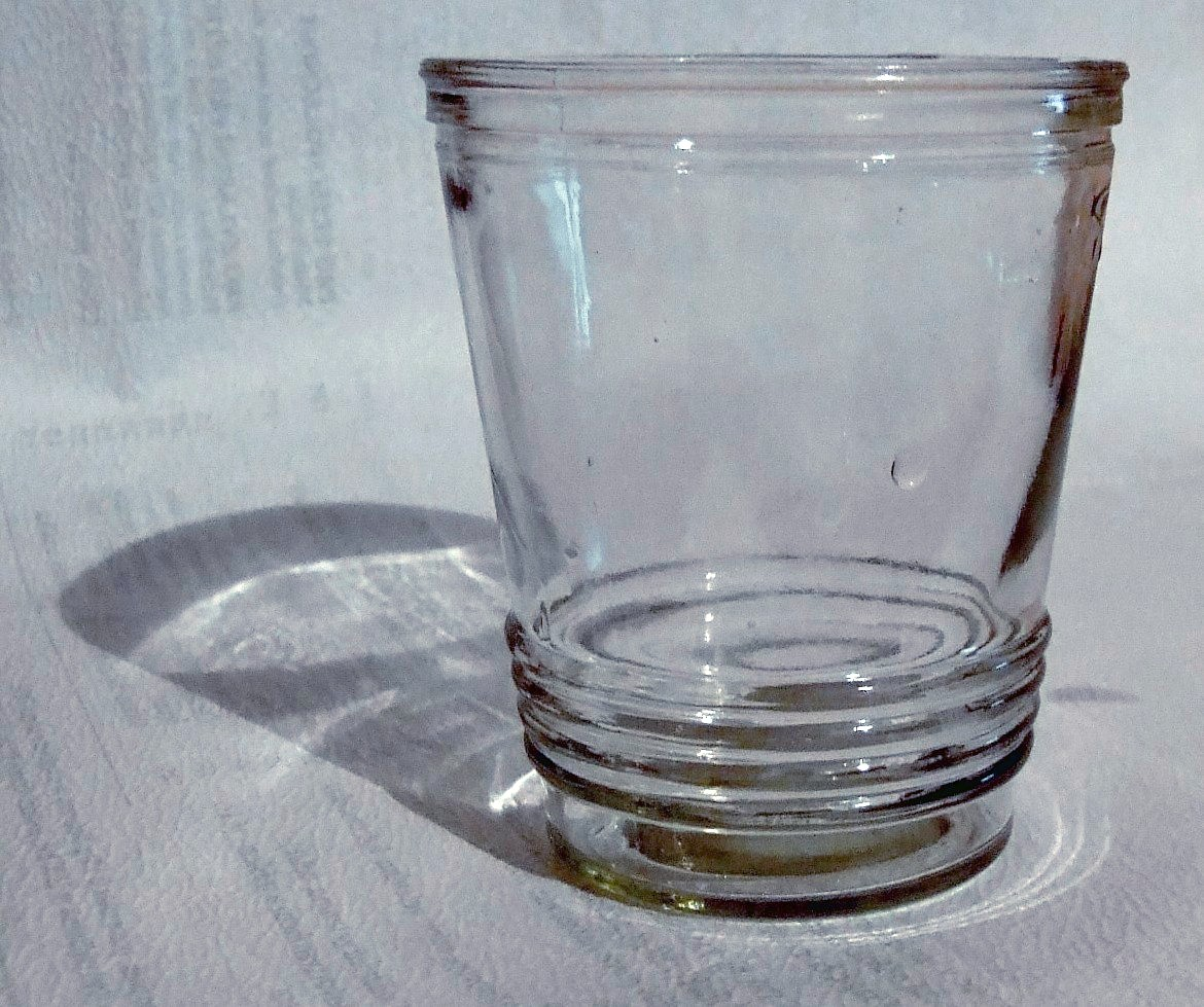 Klasyczna, peerelowska musztardówka Autor:Mohylek 01:38, 20 lip 2006 (CEST)